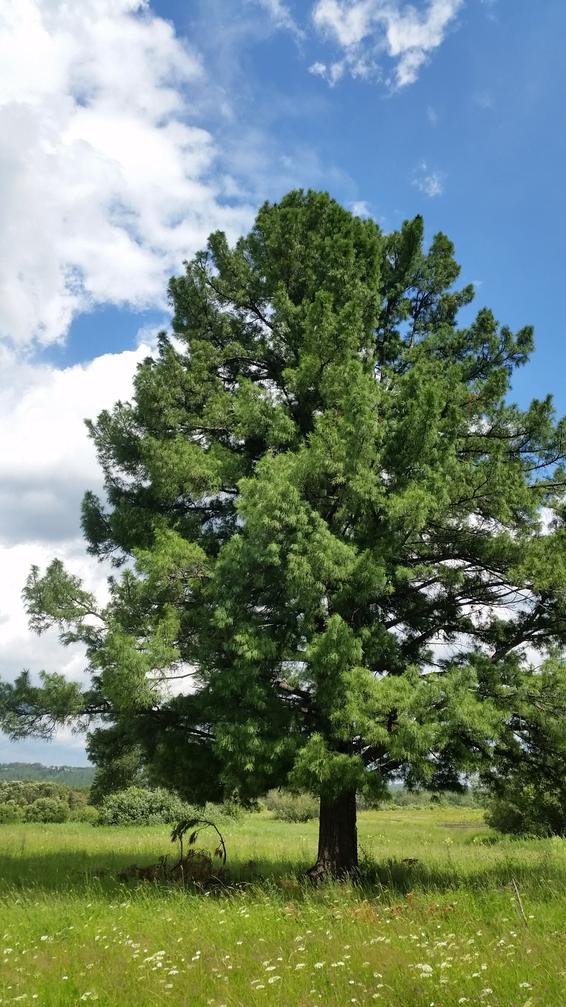 Кедр сибирский (Pinus sibirica), отдельно стоящее дерево в окрестностях села Лучаново